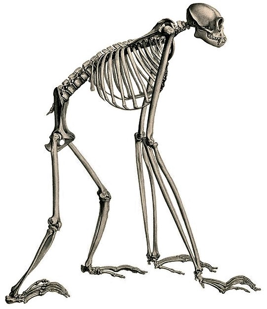 Lar gibbon skeleton